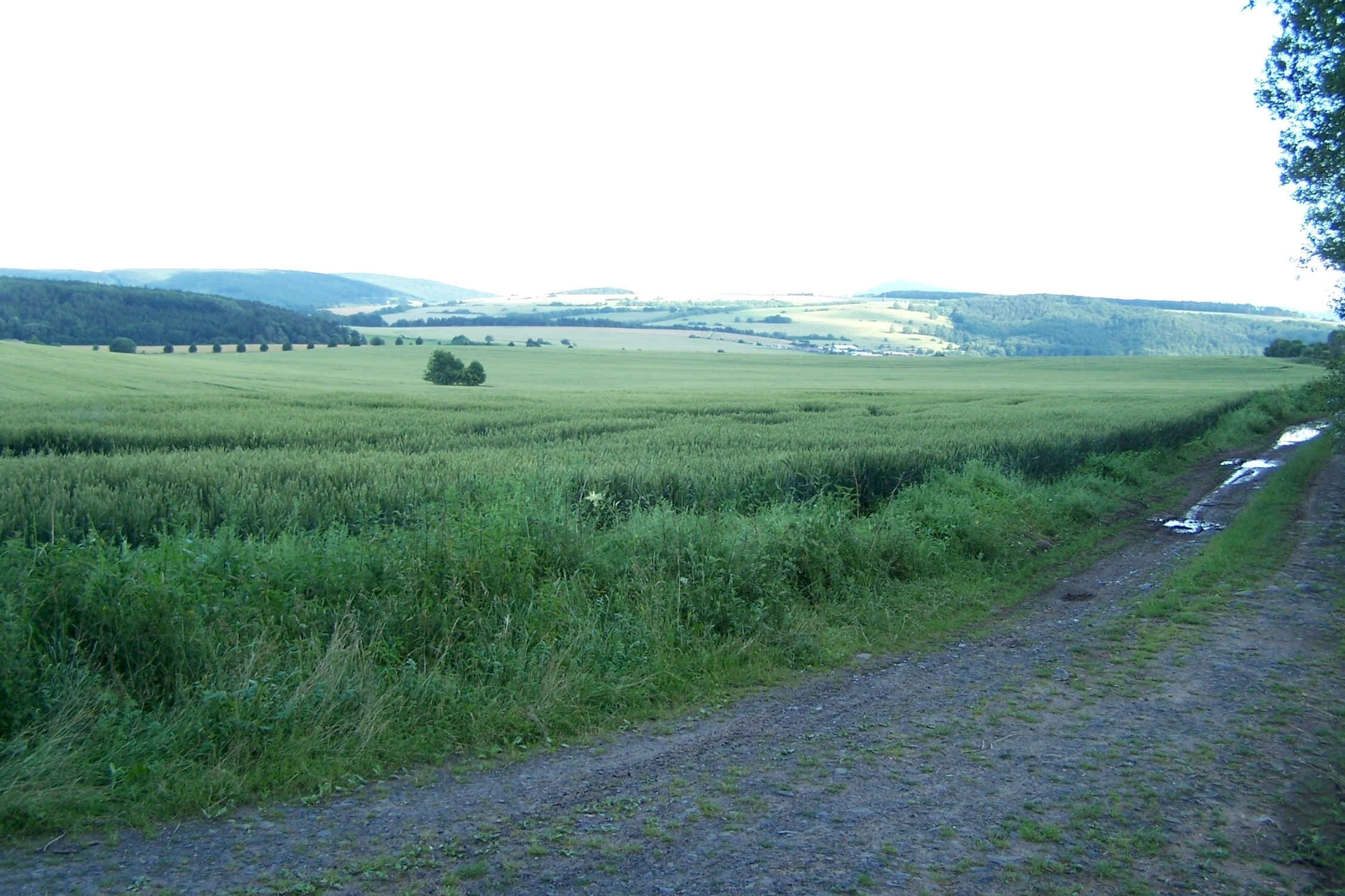 Blick vom Schwenger Weg in südlicher Richtung über die Flur der Höfe Heiligenroda und Niederndorf.